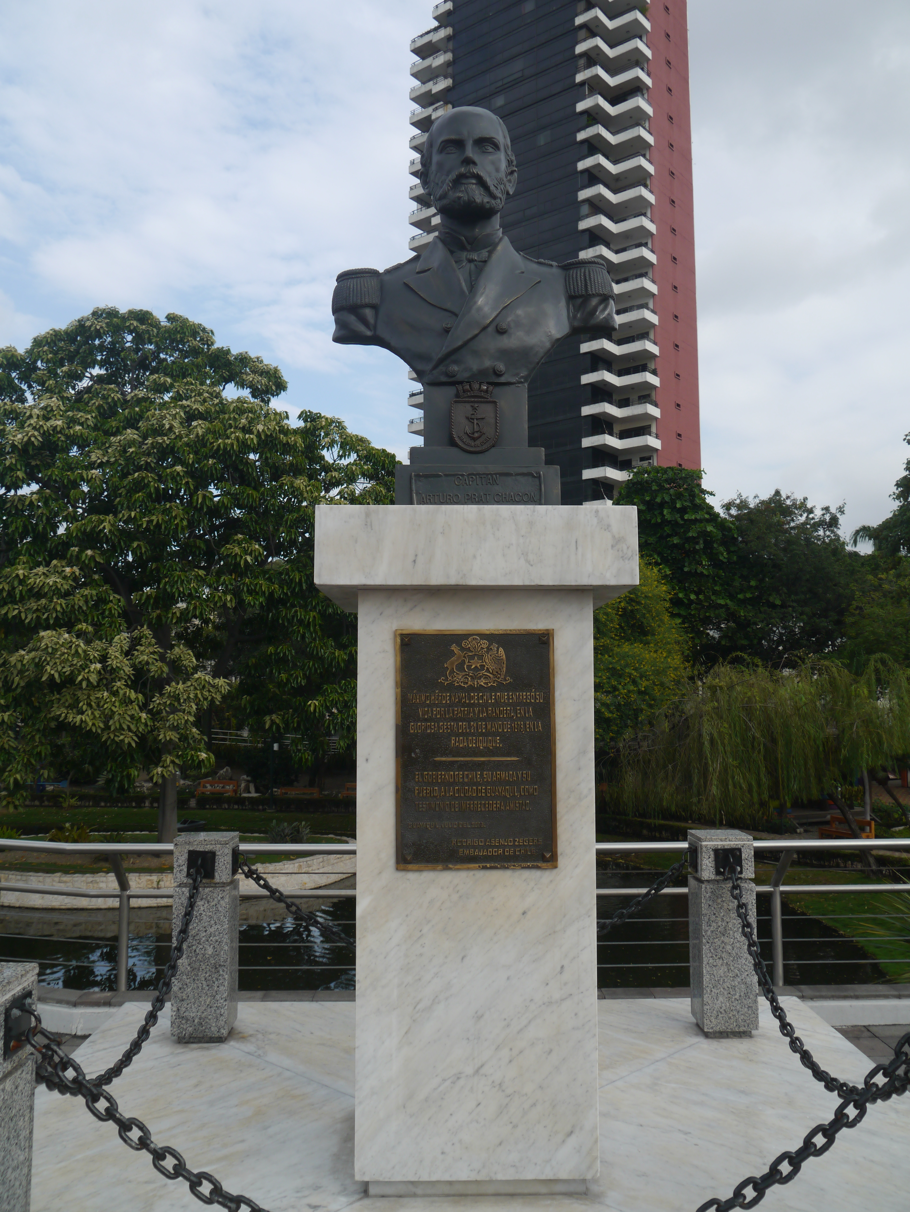 Busto del Capitán Arturo Prat Chacón en el Malecón 2000 de Guayaquil